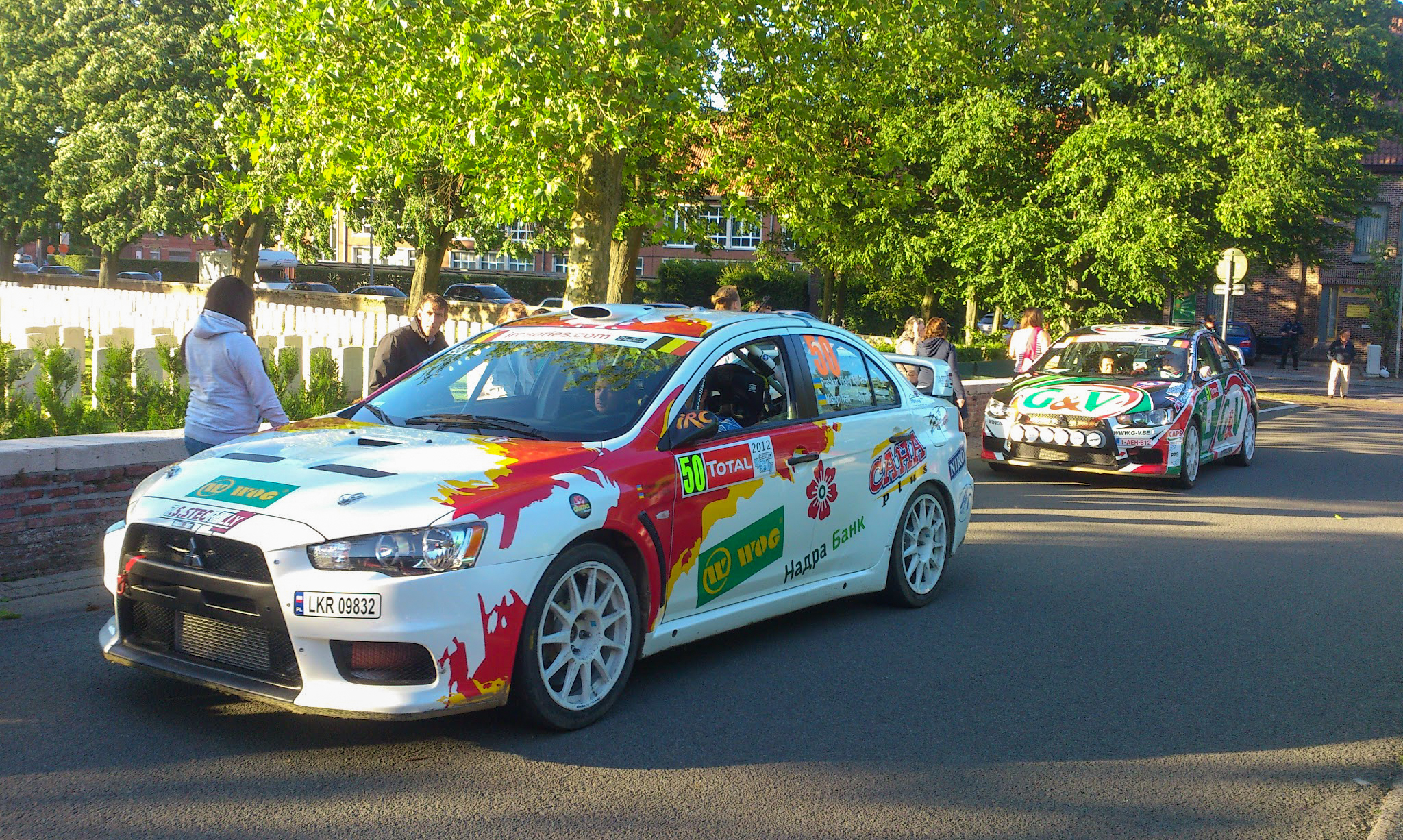 FIA GROUPE R